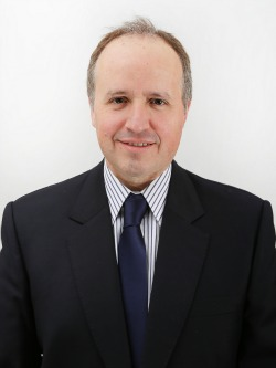 Jorge Insunza Gregorio de Las Heras